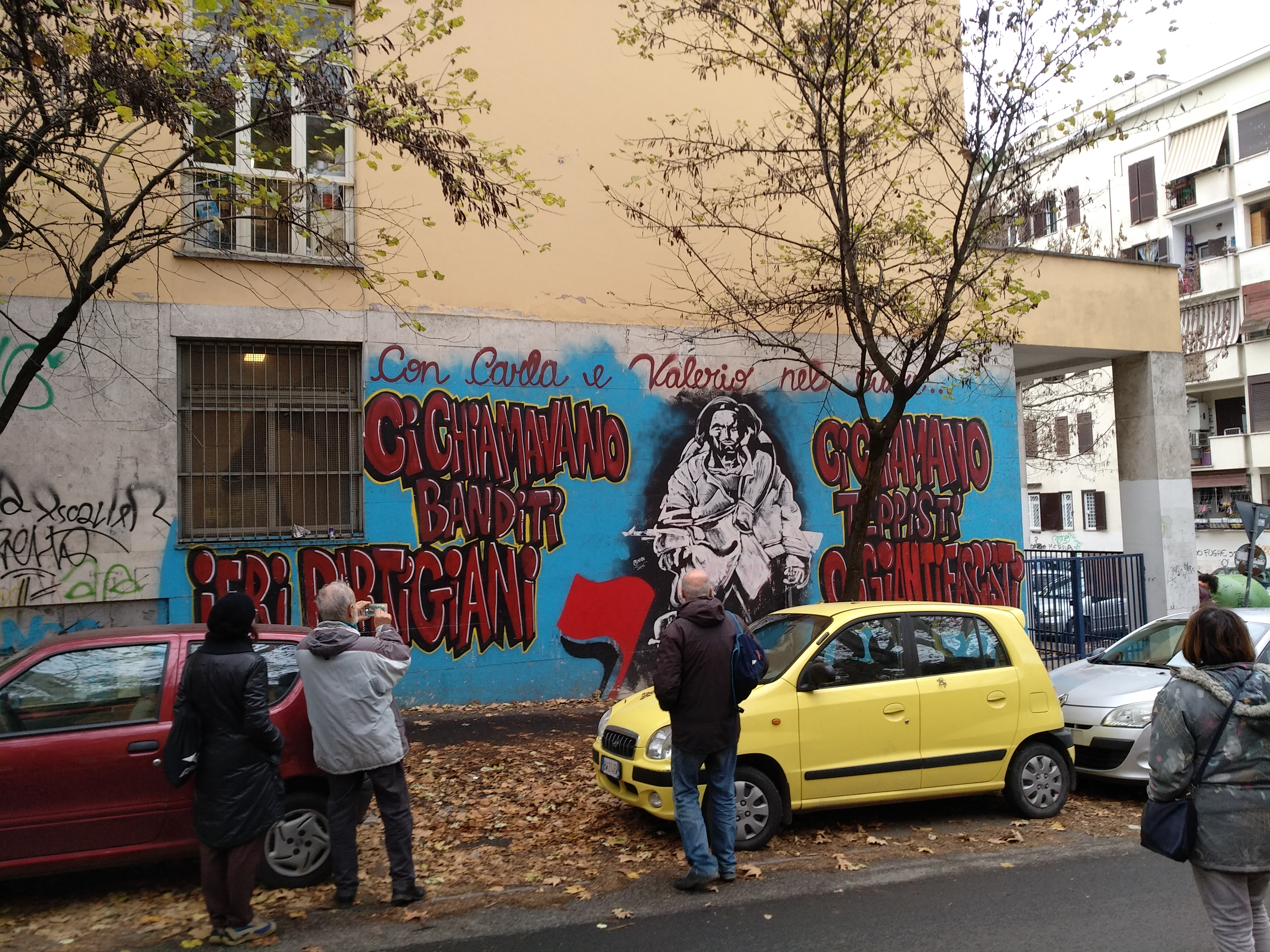 il gruppo "Visure Acatastali" in visita al Tufello nel 2018